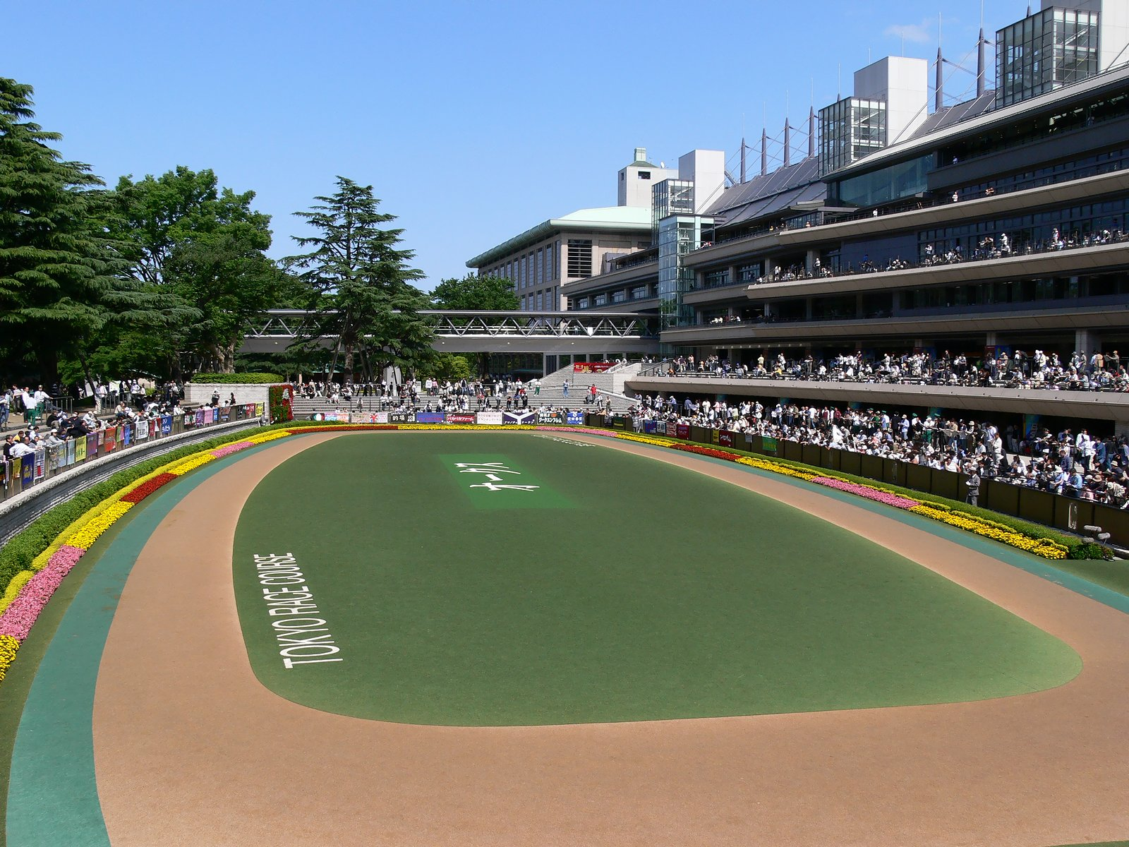 Tokyo race courseja:東京競馬場 paddock.